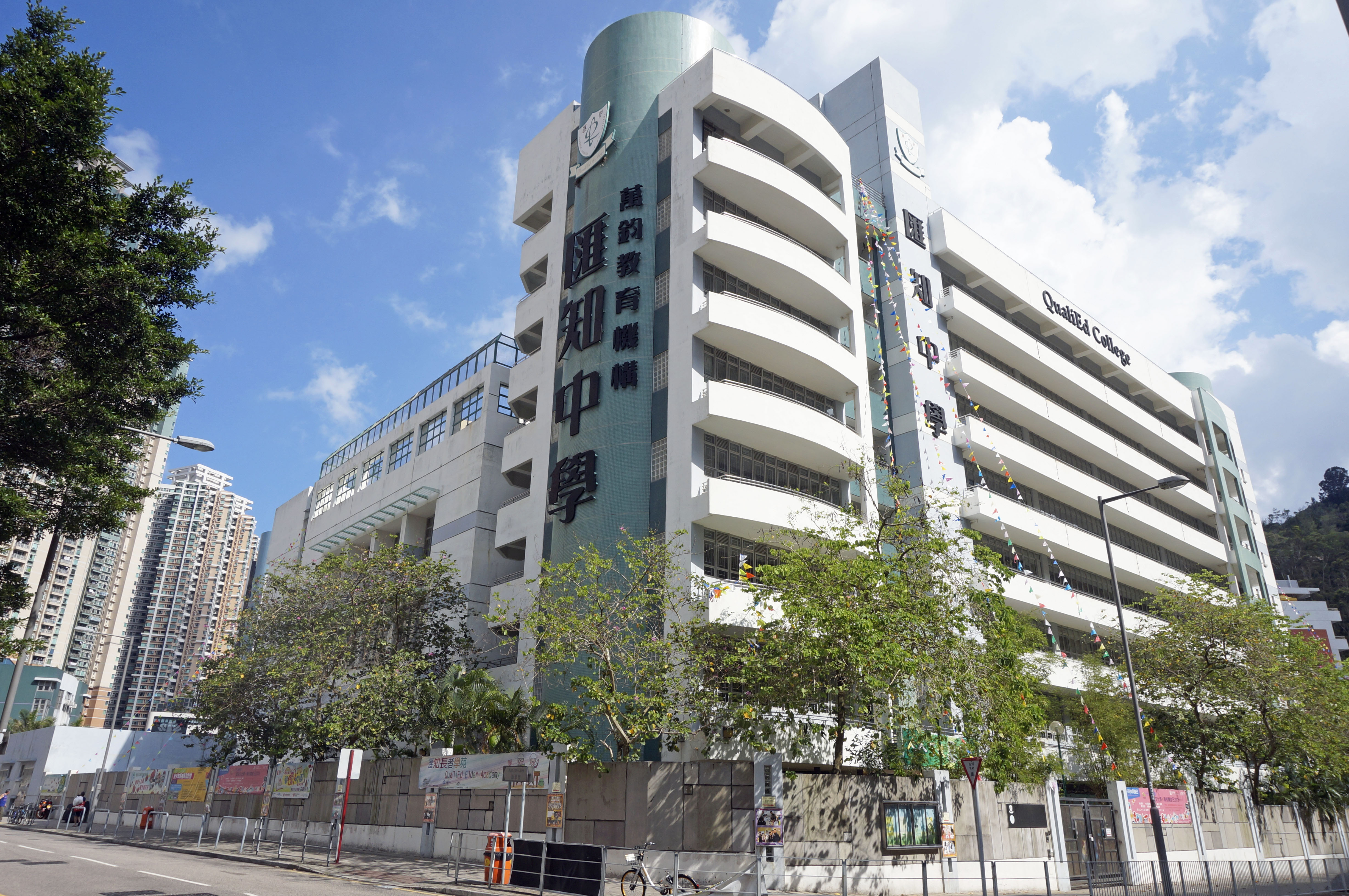 匯知中學調景嶺校舍外貌